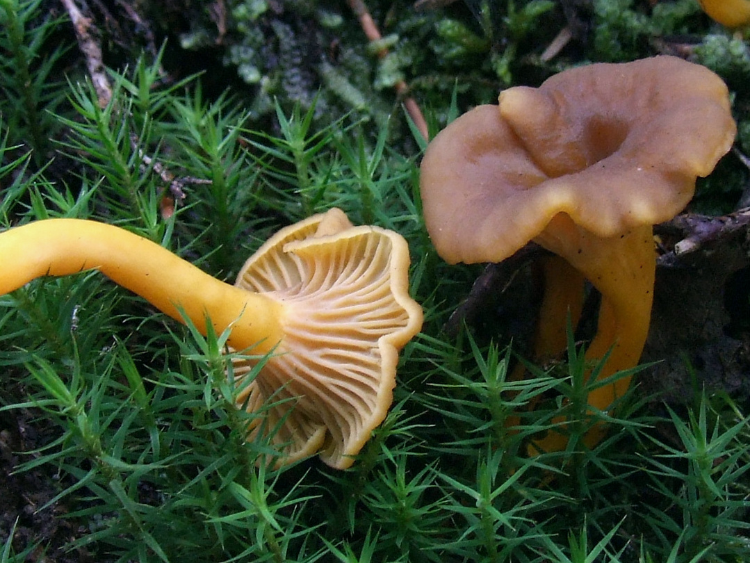 Craterellus tubaeformis (habitat:Beskid Sądecki, las świerkowy)